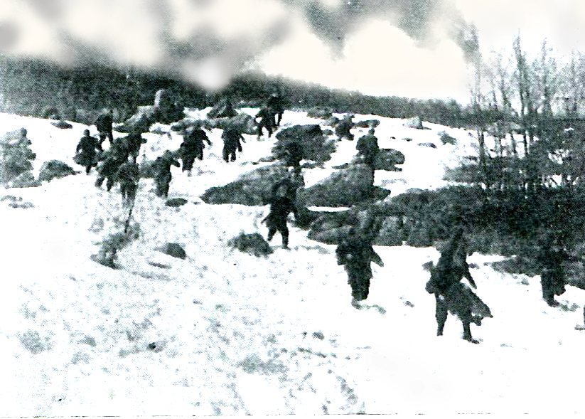 "I trecento della settima" (regia di M. Baffico, \1943) - scena del film